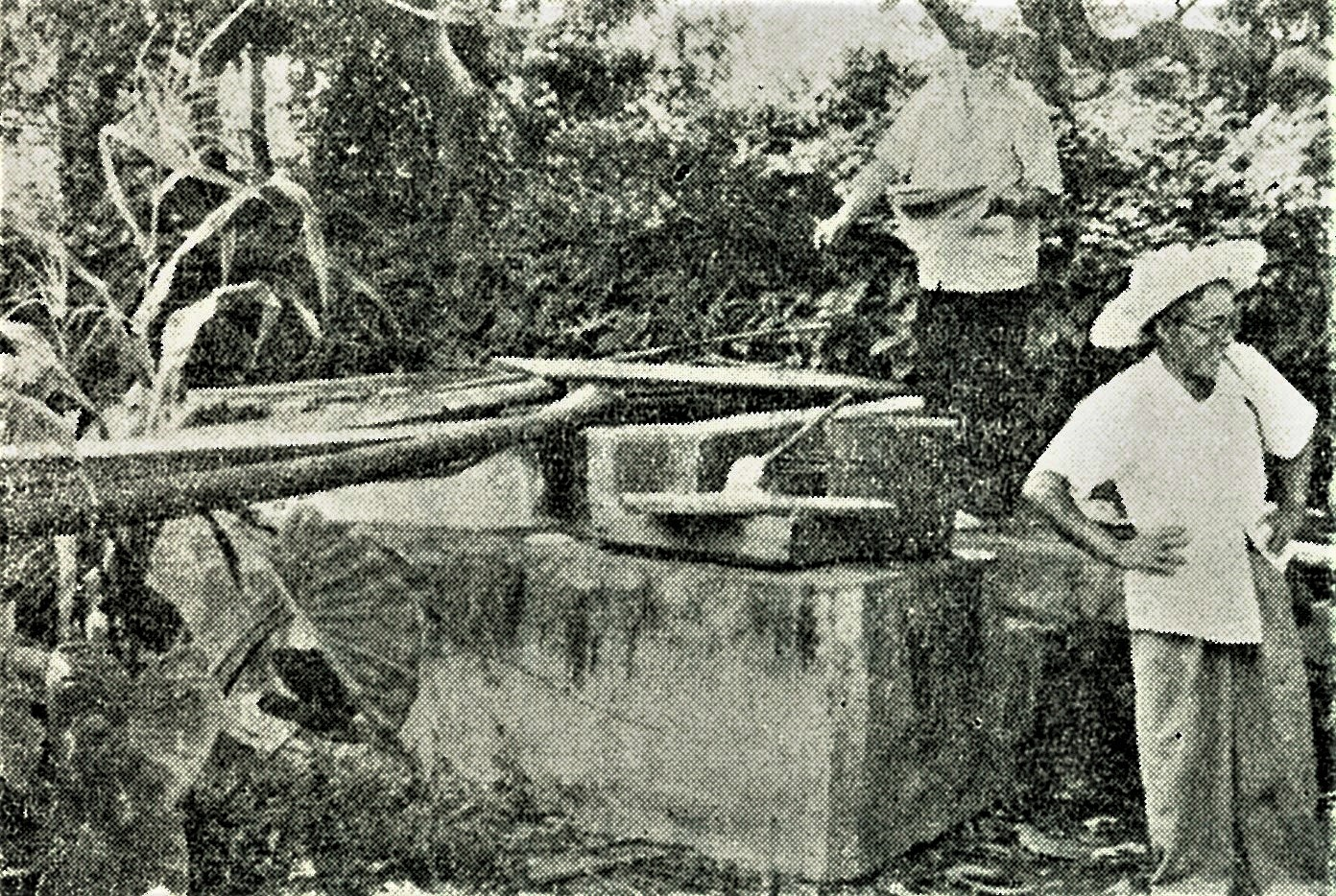 八丈小島鳥打地区の天水桶（昭和25年頃）